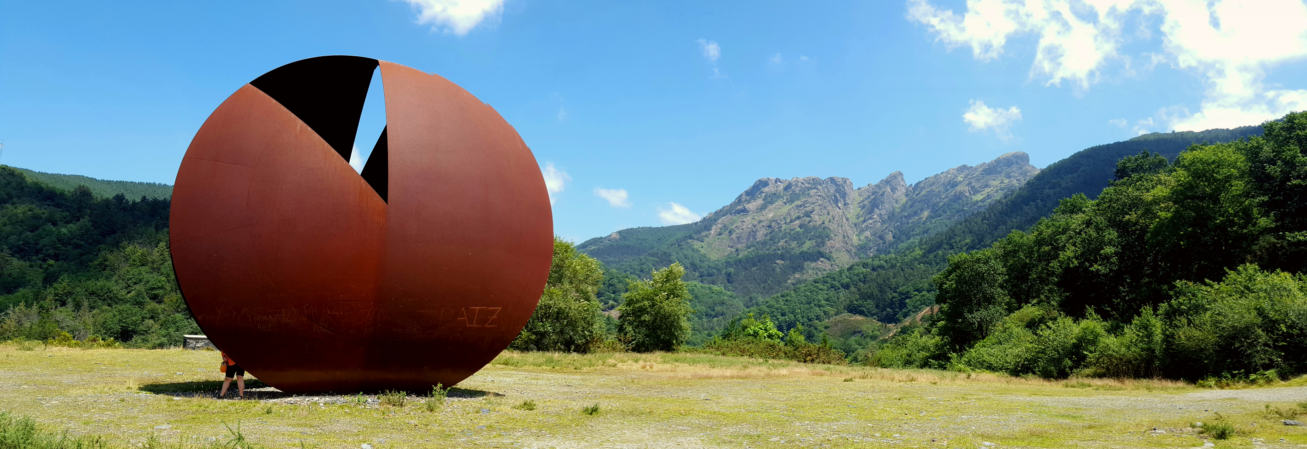 Erabatekoa eta ezdeusa Sorburua. Imanol Marrodan-en eskultura Arditurri-n